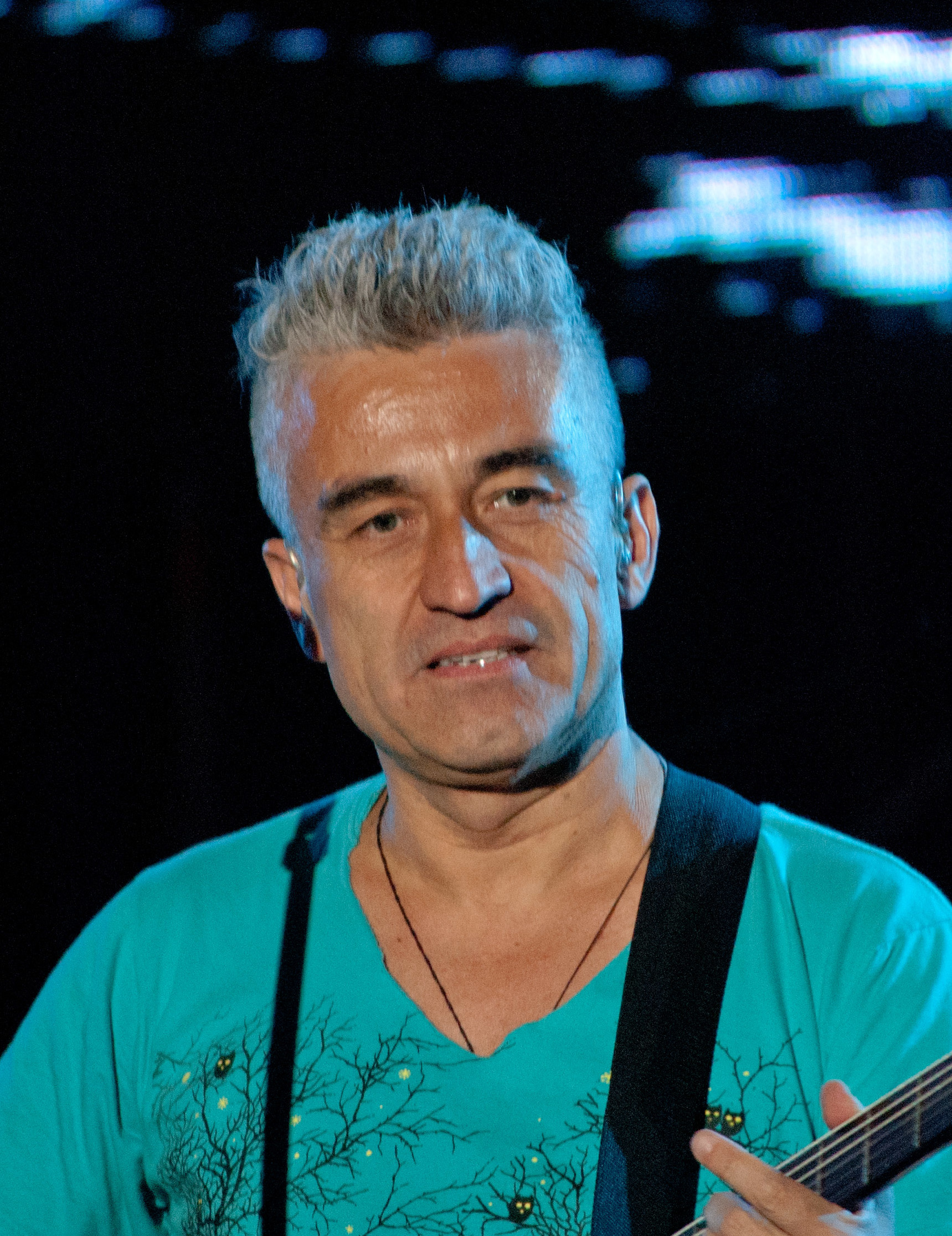 Jorge González en Primavera Fauna 2012